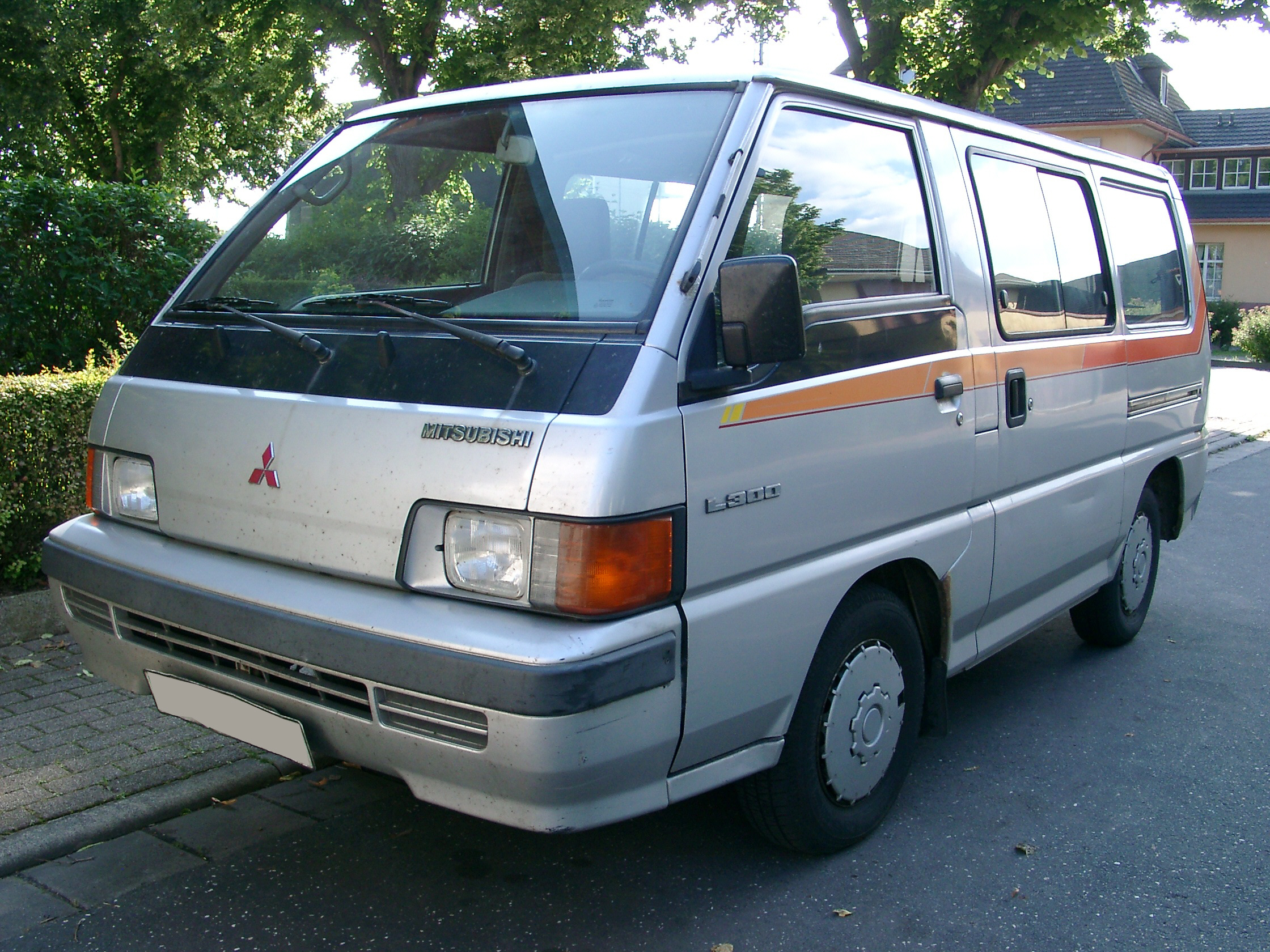 Mitsubishi Delica L300 Star Wagon (GLX Model) Generation 2